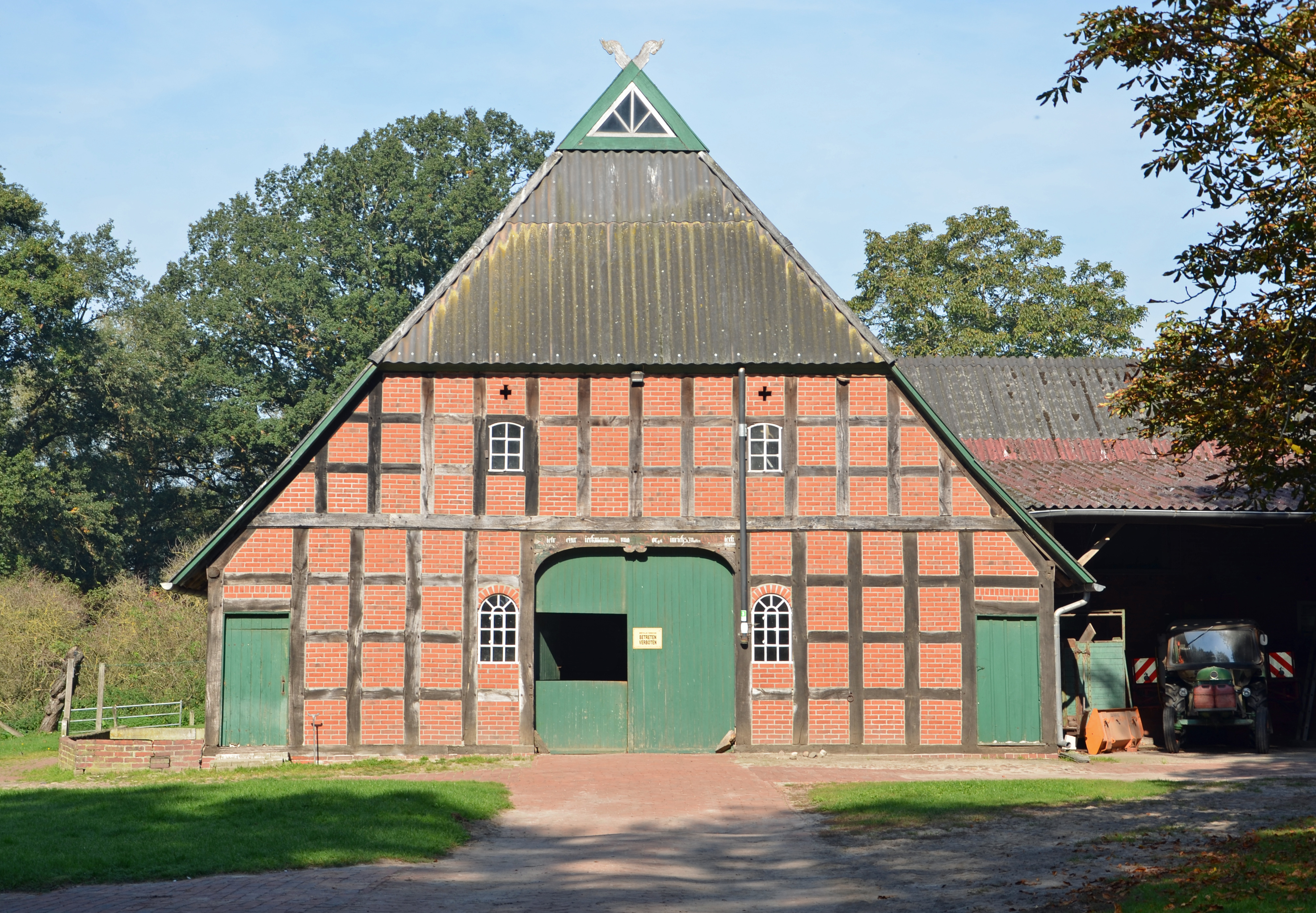 Baudenkmal Bassum Hallstedt 18